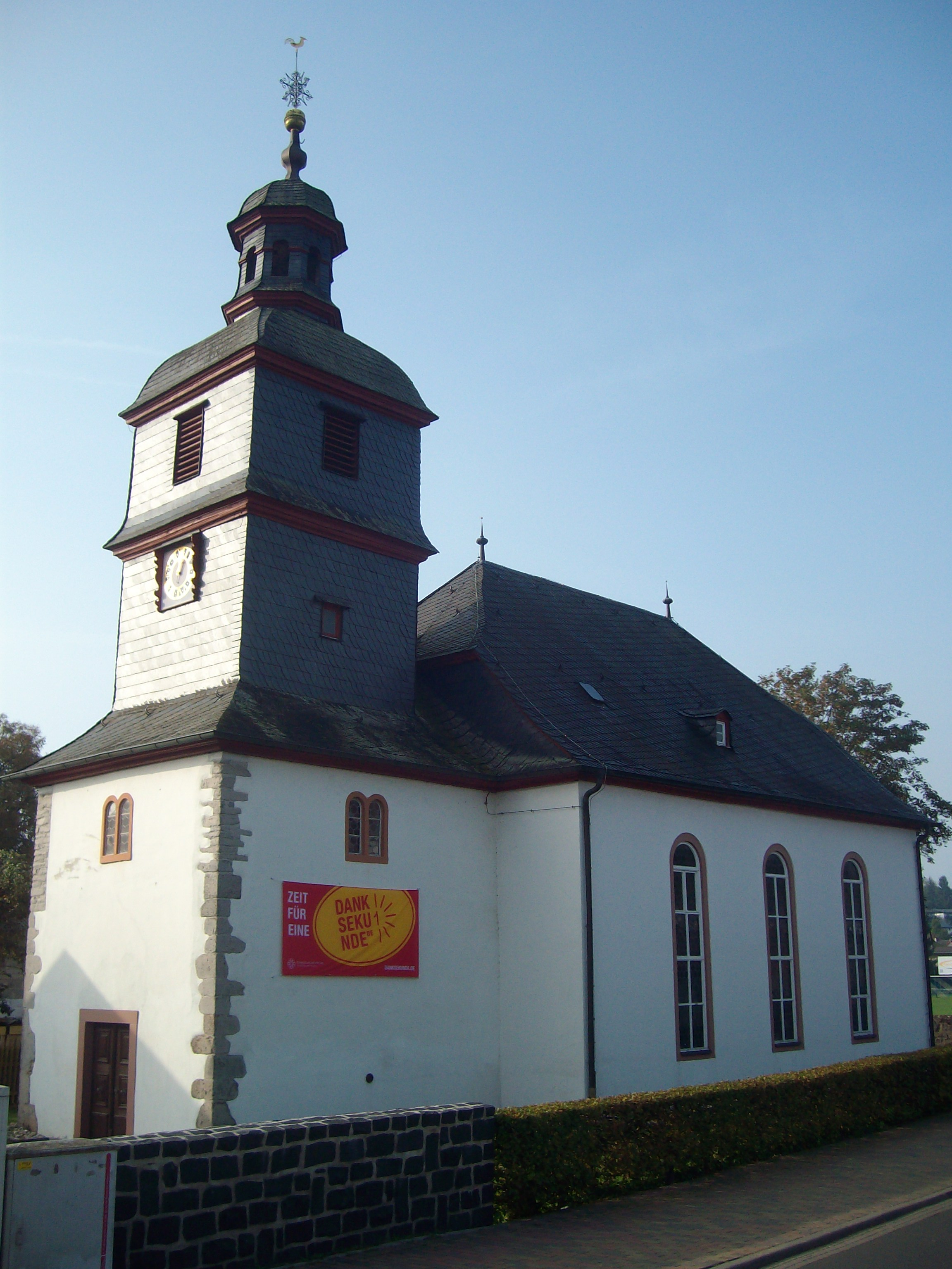 Nordseite der Evangelischen Kirche Wetterfeld, Laubach, Landkreis Gießen, Hessen, Deutschland